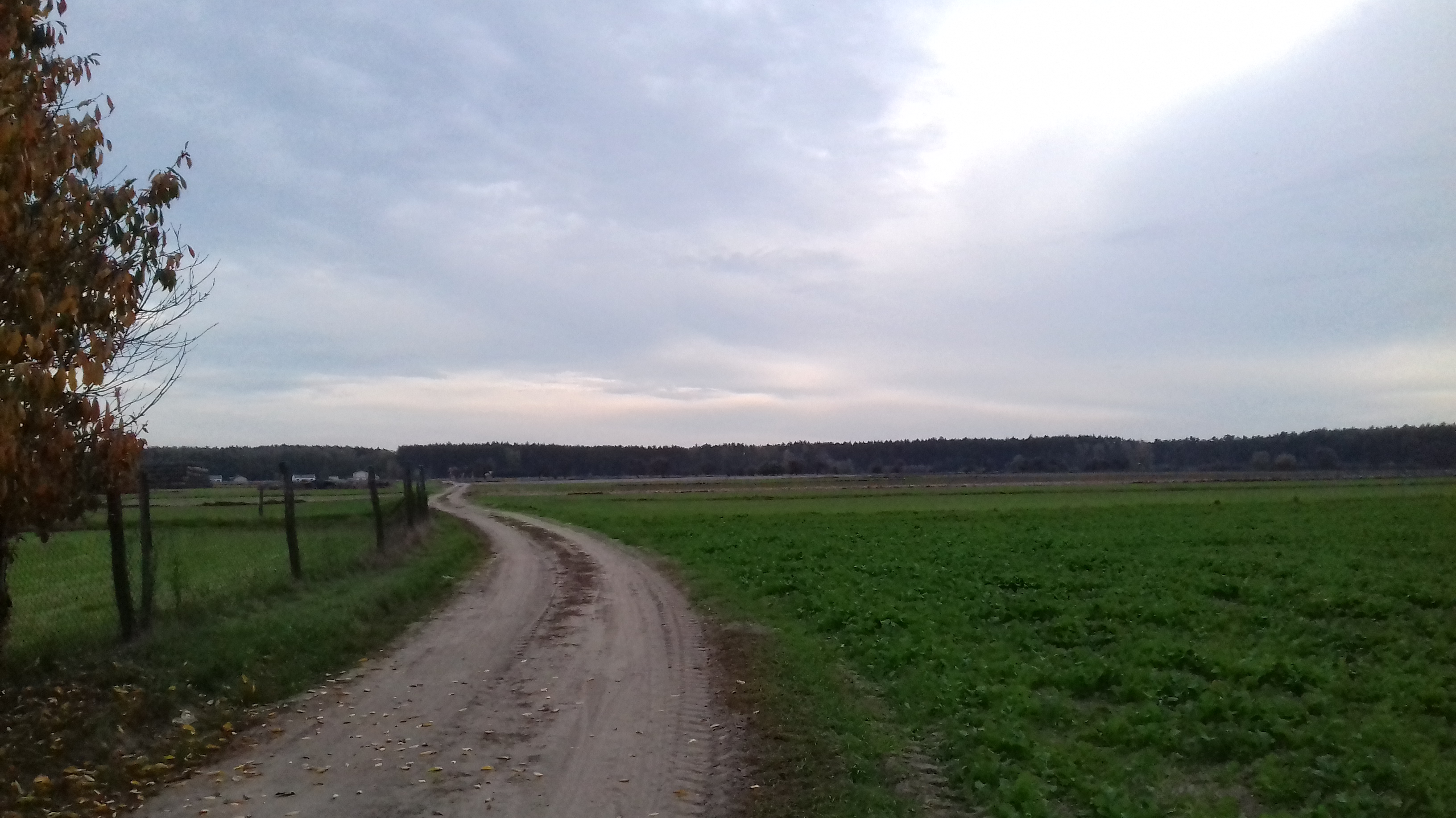 Szlak pieszy nr 186 (czerwony) w Błażejewie